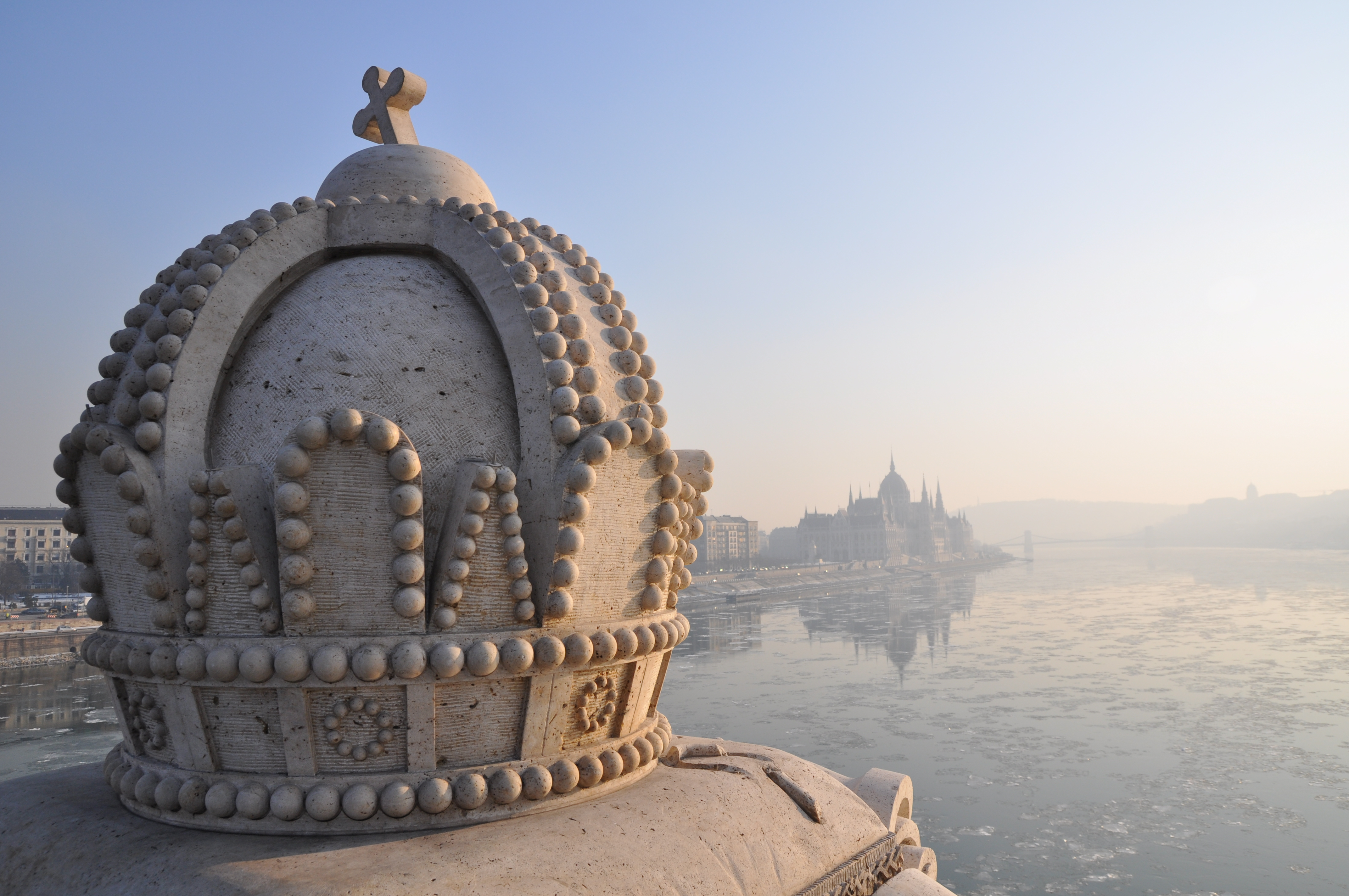 Budapest, kilátás a Margit hídról